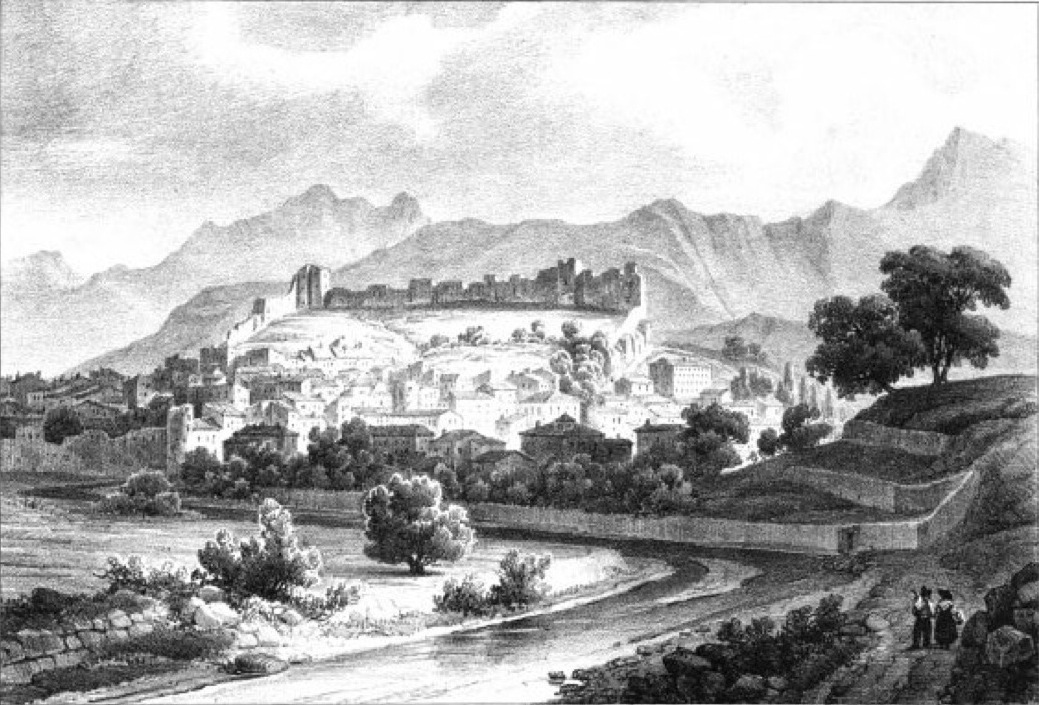 Album du Dauphiné - tome IV, litographie de Die (Drôme)